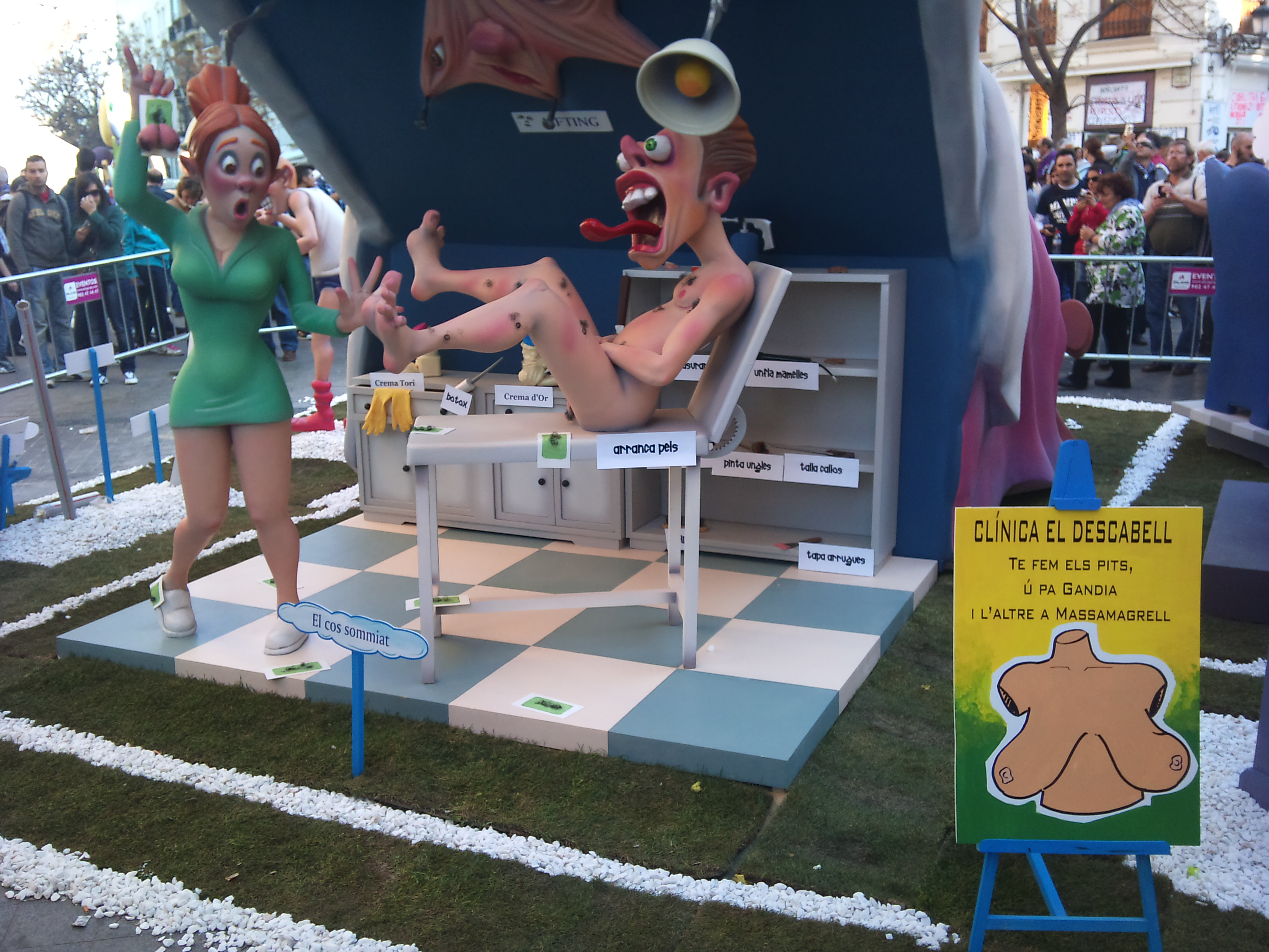 Ninot sobre la depilació